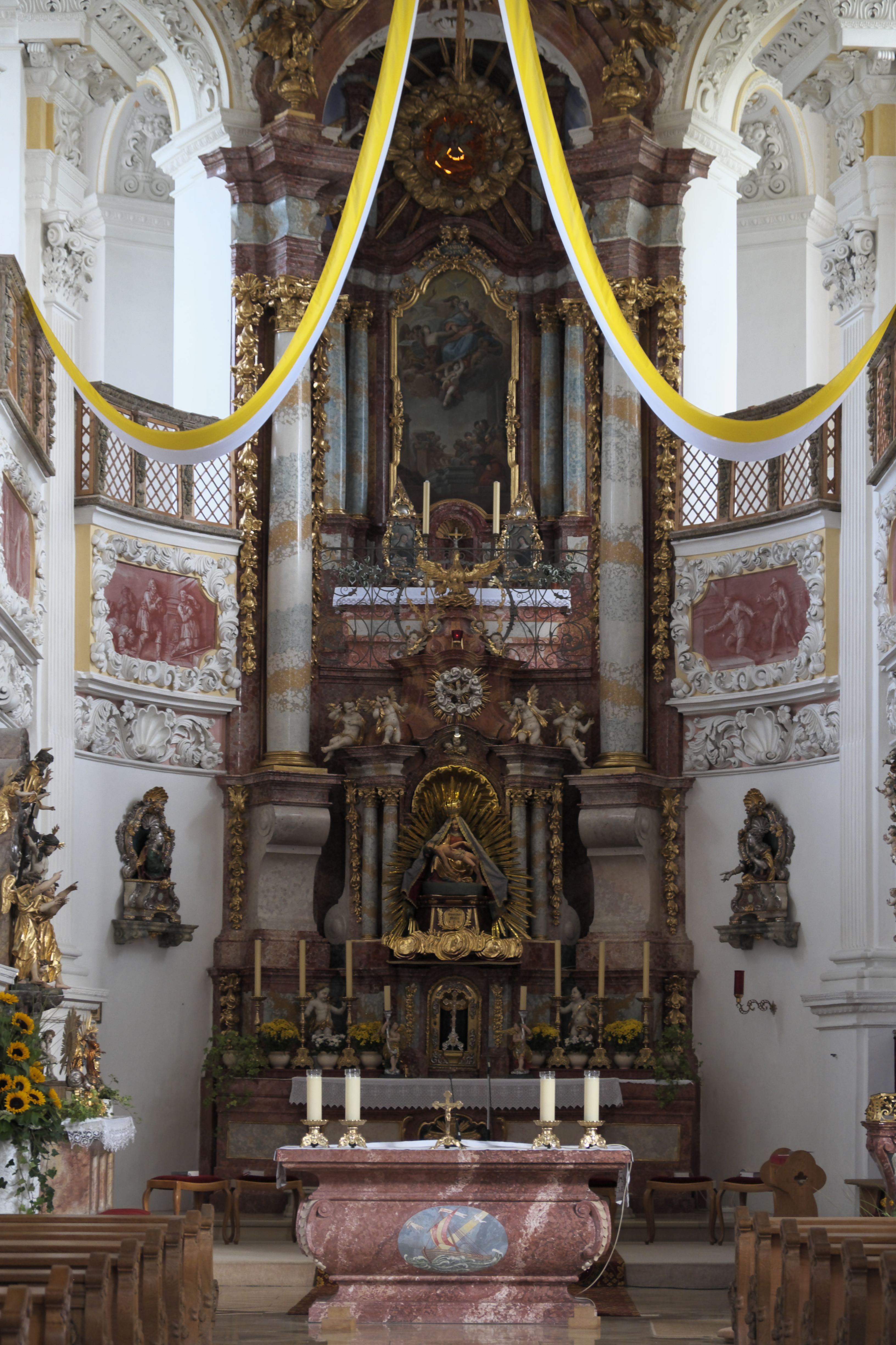 Katholische Wallfahrtskirche Mariä Schmerzen in Vilgertshofen im Landkreis Landsberg am Lech (Bayern/Deutschland), Innenraum